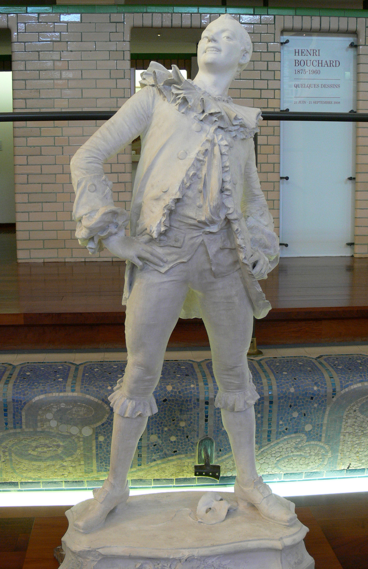 Sculpture en plâtre (esquisse ou modèle préparatoire ?) d'André Laoust, (1843-1924) intitulée Pierrot, datée de 1889, Don de l'auteur en 1904 au musée de Roubaix N° inventaire 2999-874-22